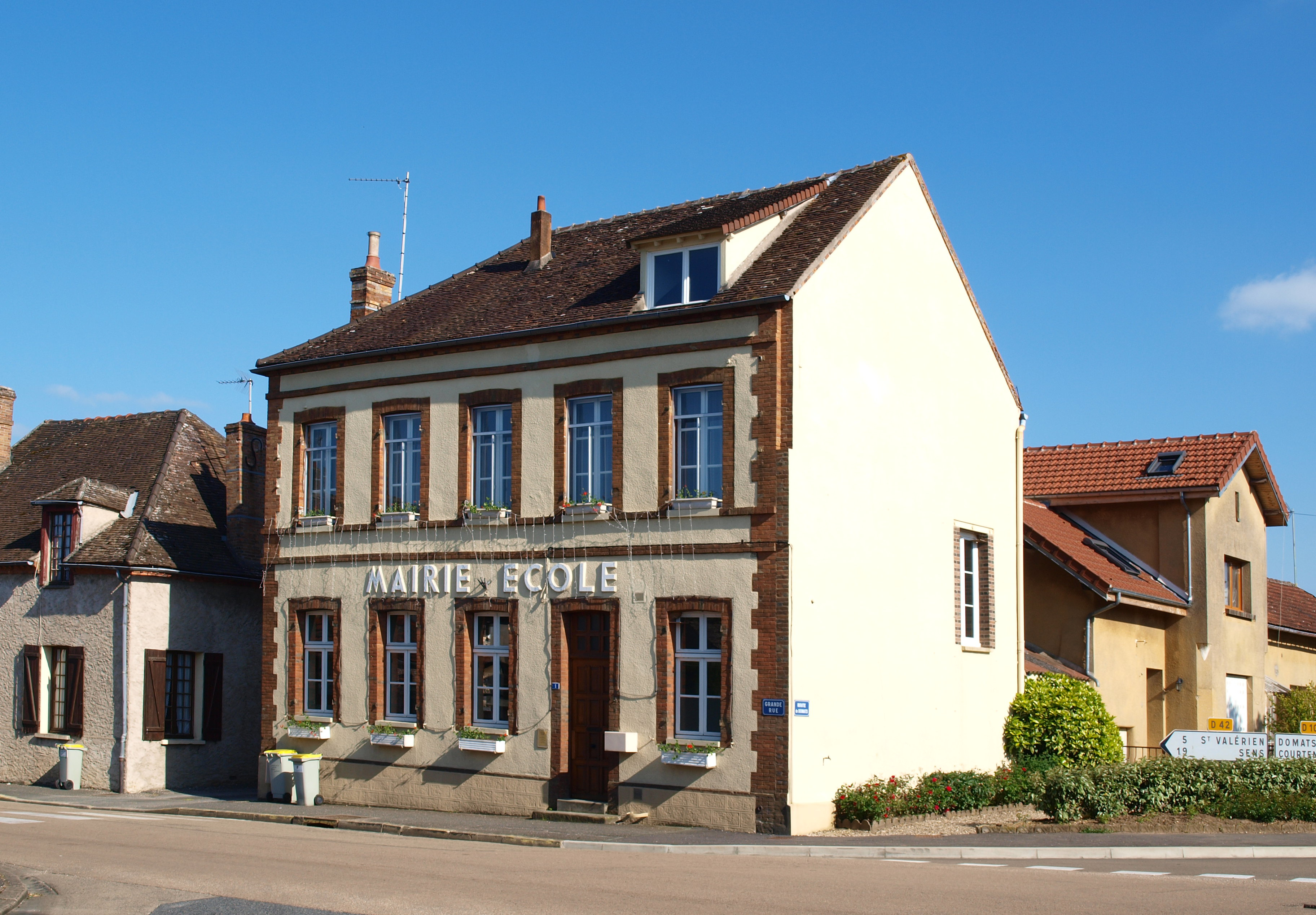 Montacher-Villegardin (Yonne, France)